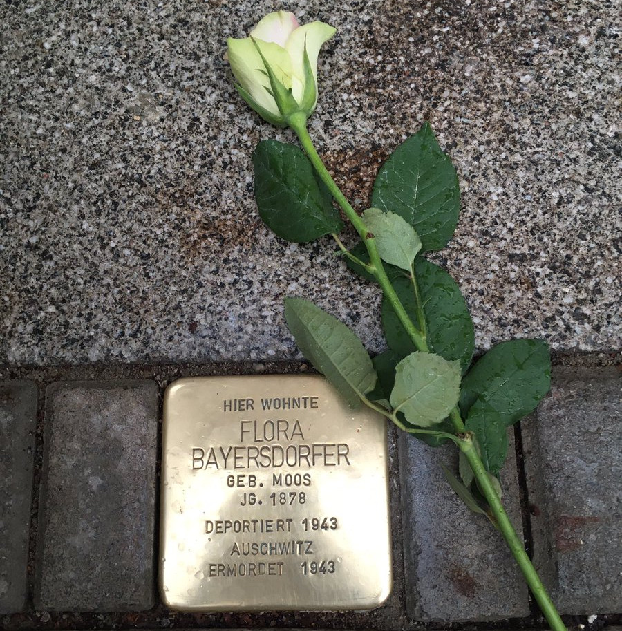 Stolperstein Neu-Ulm Flora Bayersdorfer